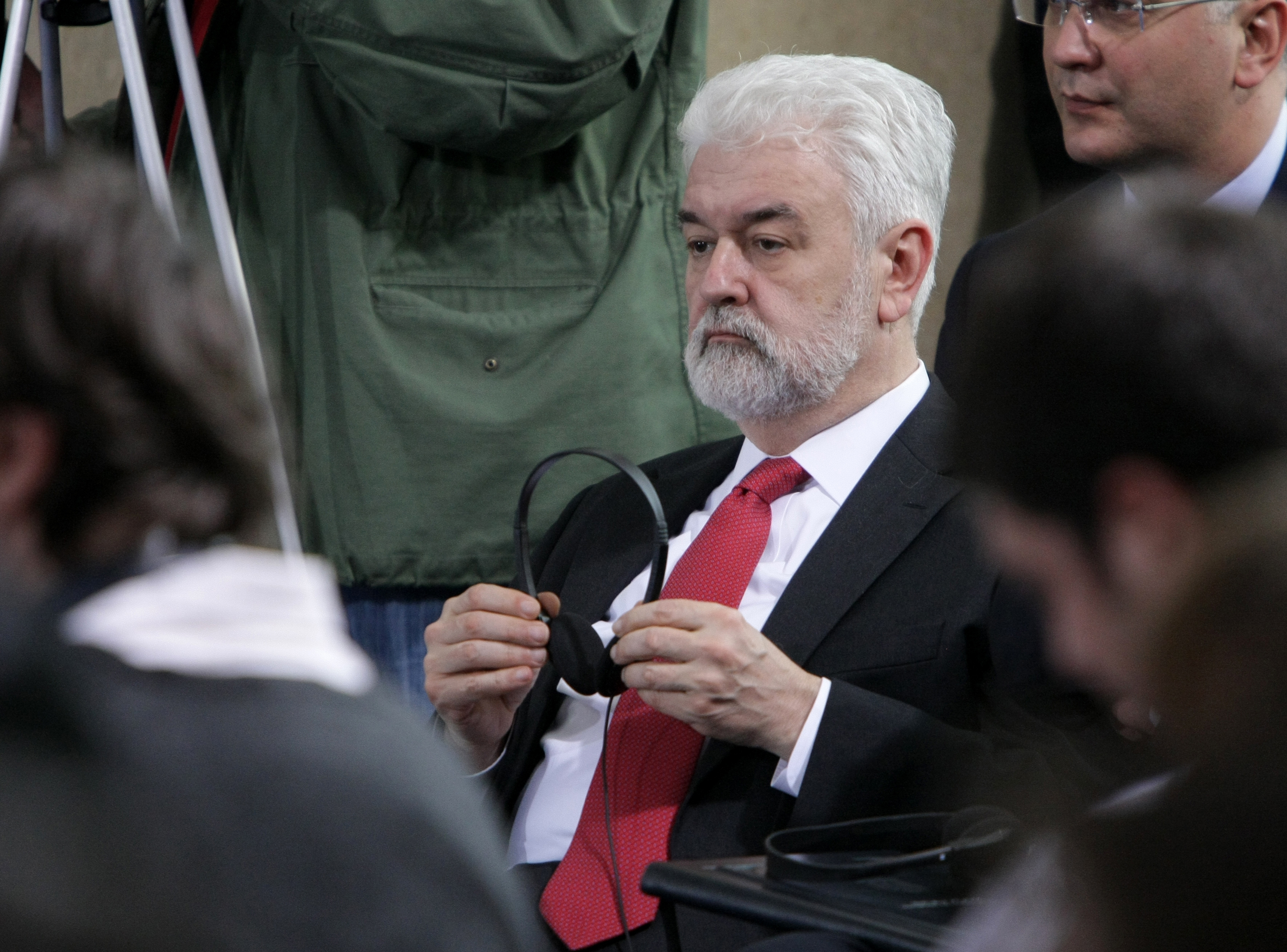 По итогам российско-сербских переговоров В.В.Путин и Б.Тадич провели совместную пресс-конференцию